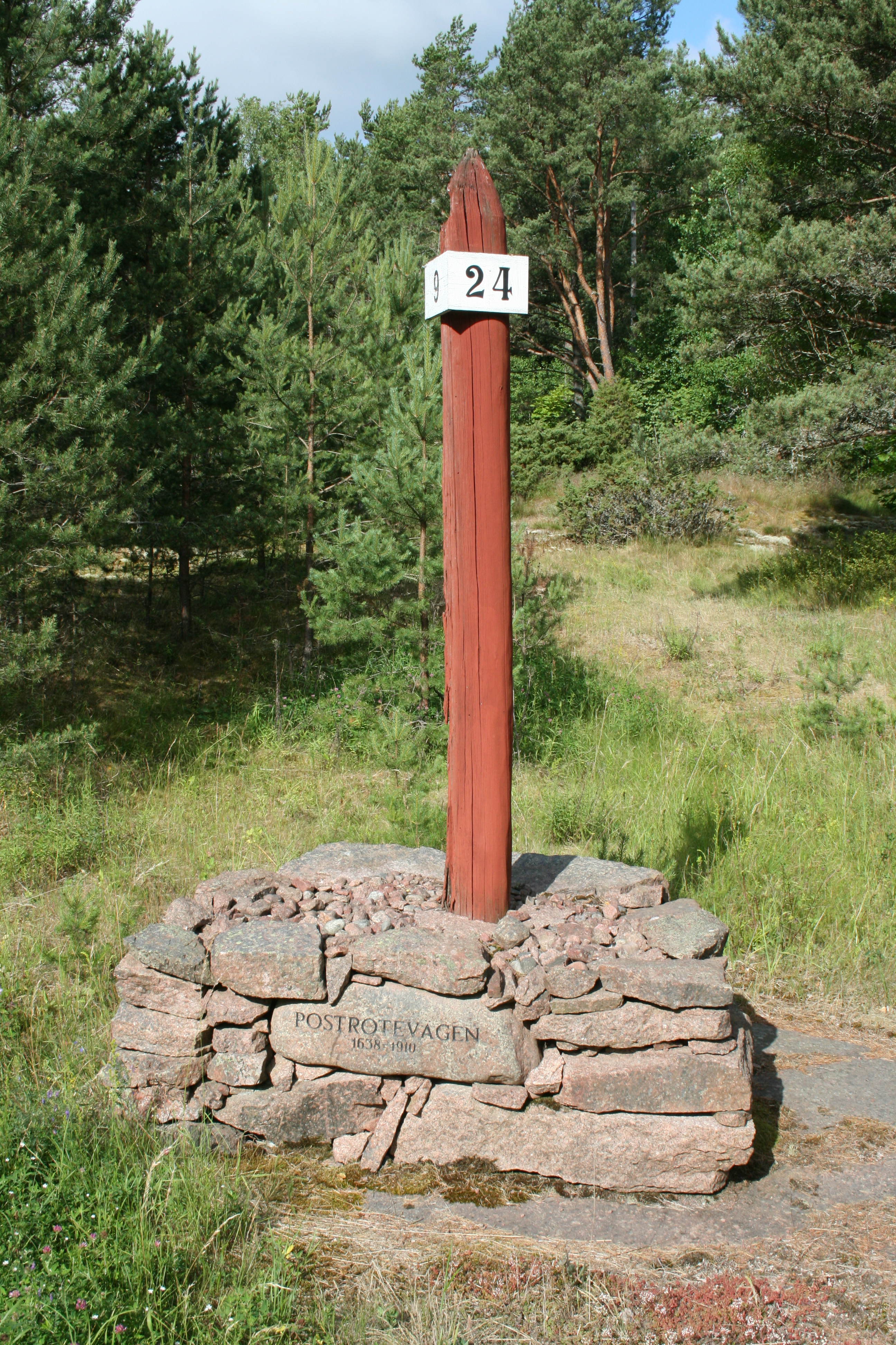 Suuren postitien muistoksi on sen reitti merkitty pylväin Ahvenanmaalla